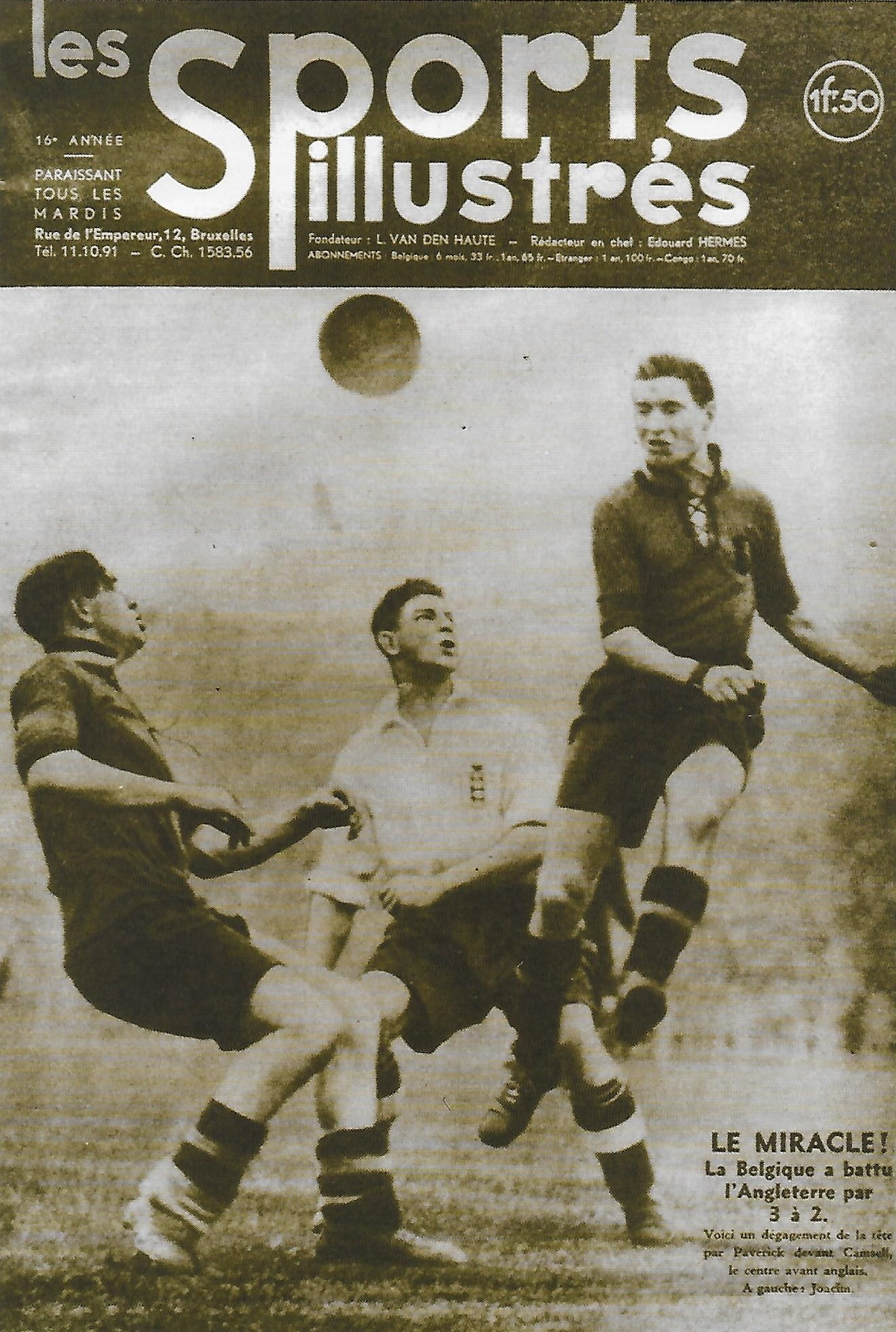 La victoire par 3-2 de la Belgique contre l'Angleterre, en 1936, fut le plus retentissant succès du sport belge avant la Seconde Guerre Mondiale.